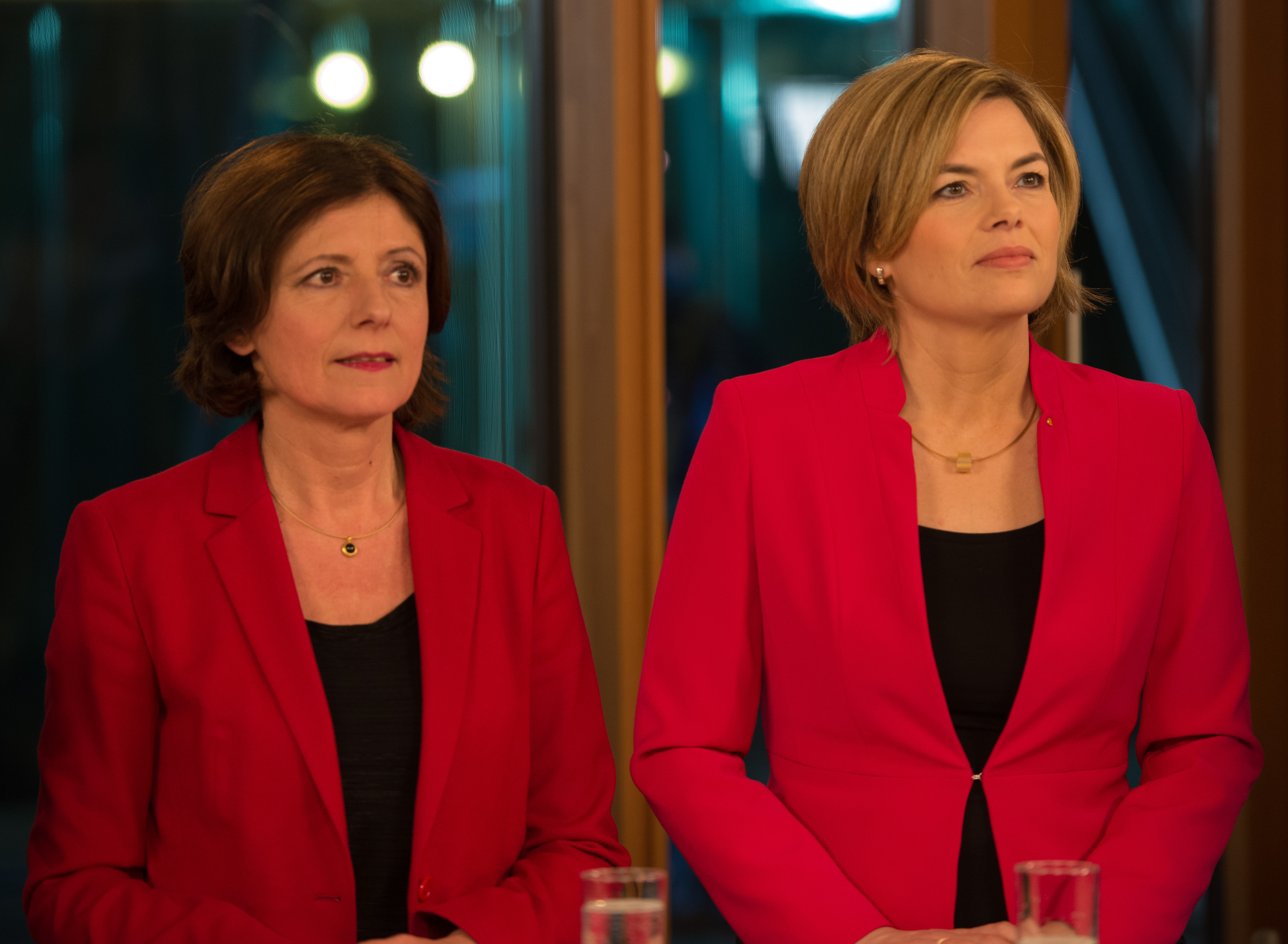 Interviewrunde des ZDF gegen 19:00 Uhr am Abend der Landtagswahl am 13. März 2016 im Abgeordnetenhhaus